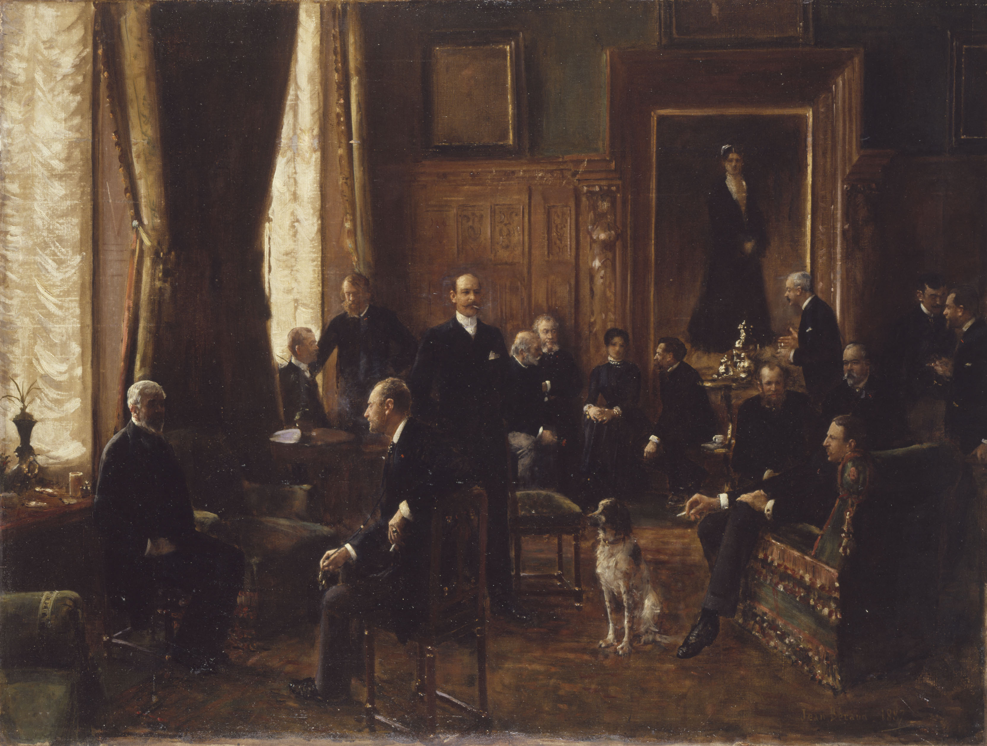 Auteur(s) : Jean Béraud Date de production : 1887 Dimensions - Œuvre : Hauteur : 66 cm ; Largeur : 86 cm Signature - Signé et daté en bas à droite : "Jean Béraud 1887". Description iconographique : sur le mur du fond est accroché le portrait de la comtesse par Bonnat. Musée Carnavalet